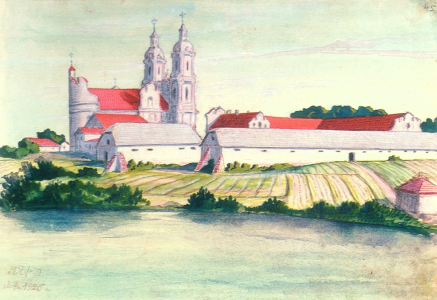 Беразвецкі кляштар